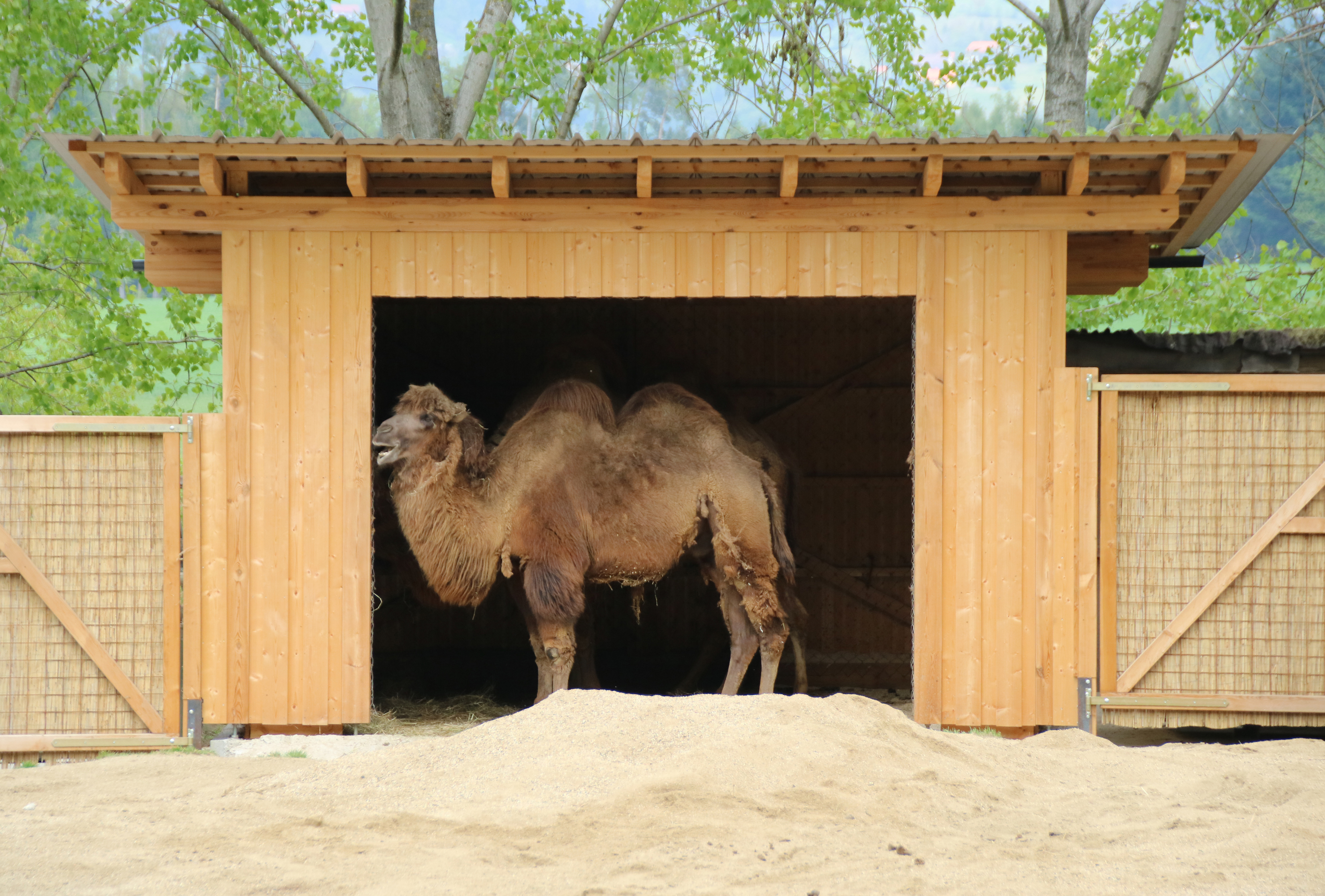 Trampeltier (Camelus ferus) in der Tierwelt Herberstein